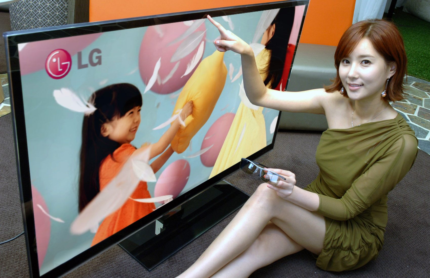 ※ LG전자 뉴스룸 에서 관련 보도자료를 확인실 수 있습니다.